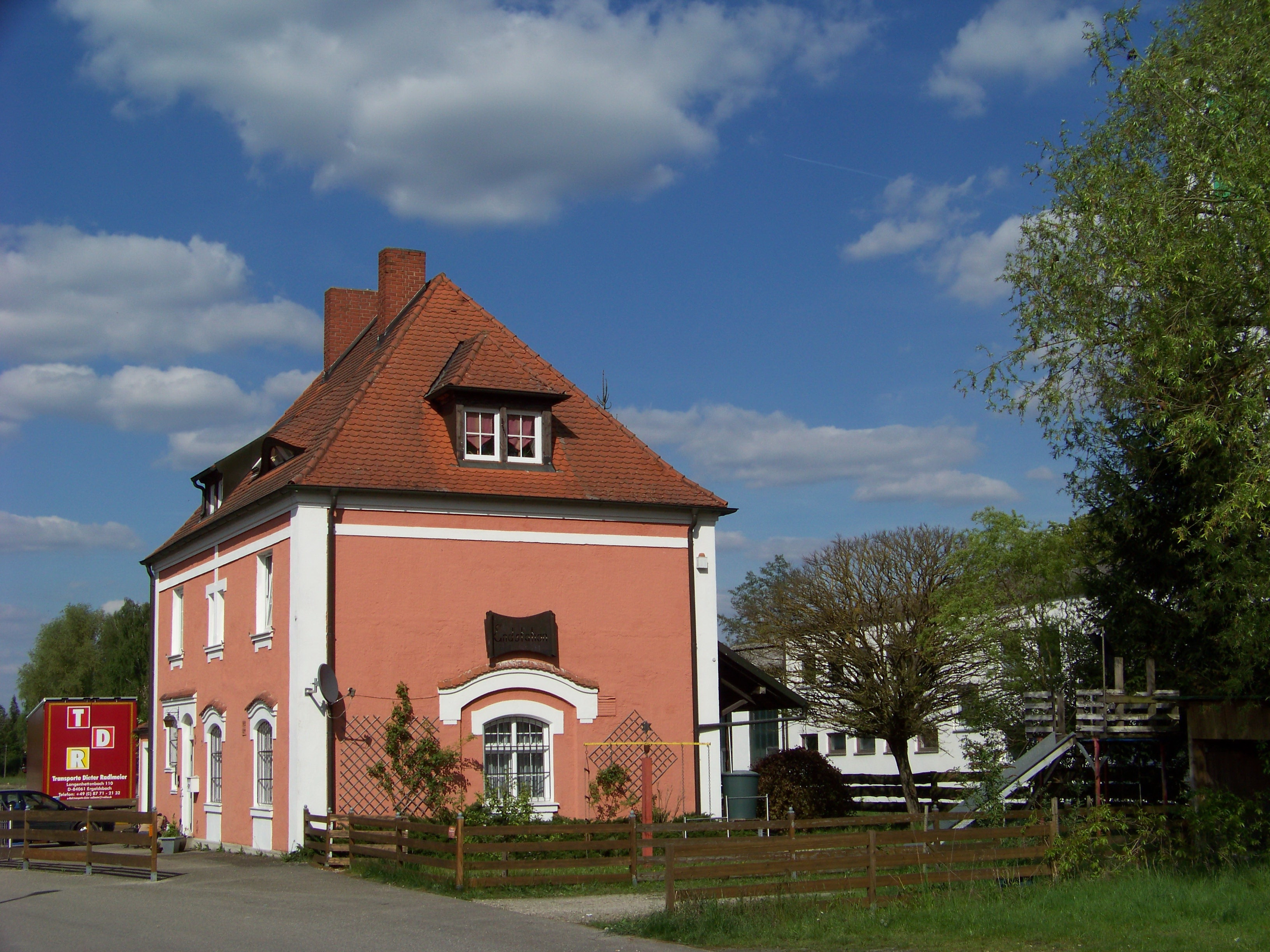 Langquaid, Am Bahnhof 3. Ehemaliges Bahnhofsgebäude. Zweigeschossiger Walmdachbau in reduzierten Barockformen, um 1903.